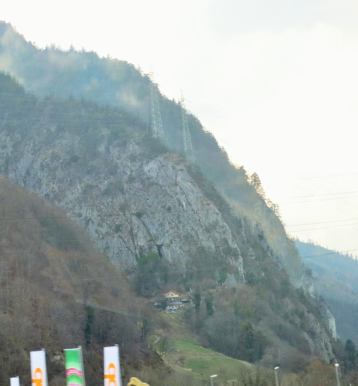 Artilleriewerk Nussloch, Mastrils GR, Schweiz